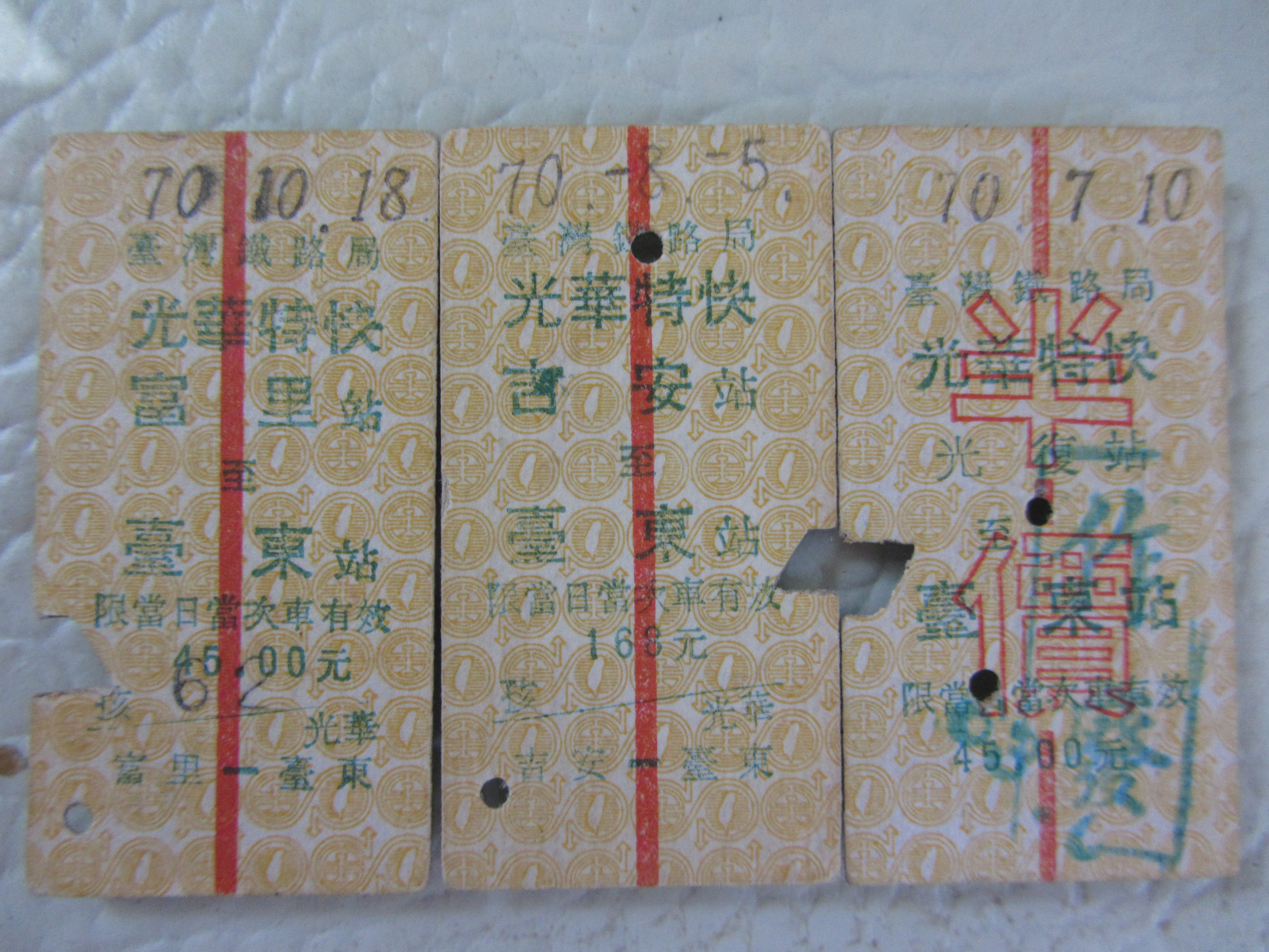 台鐵舊東幹線光華號名片式車票